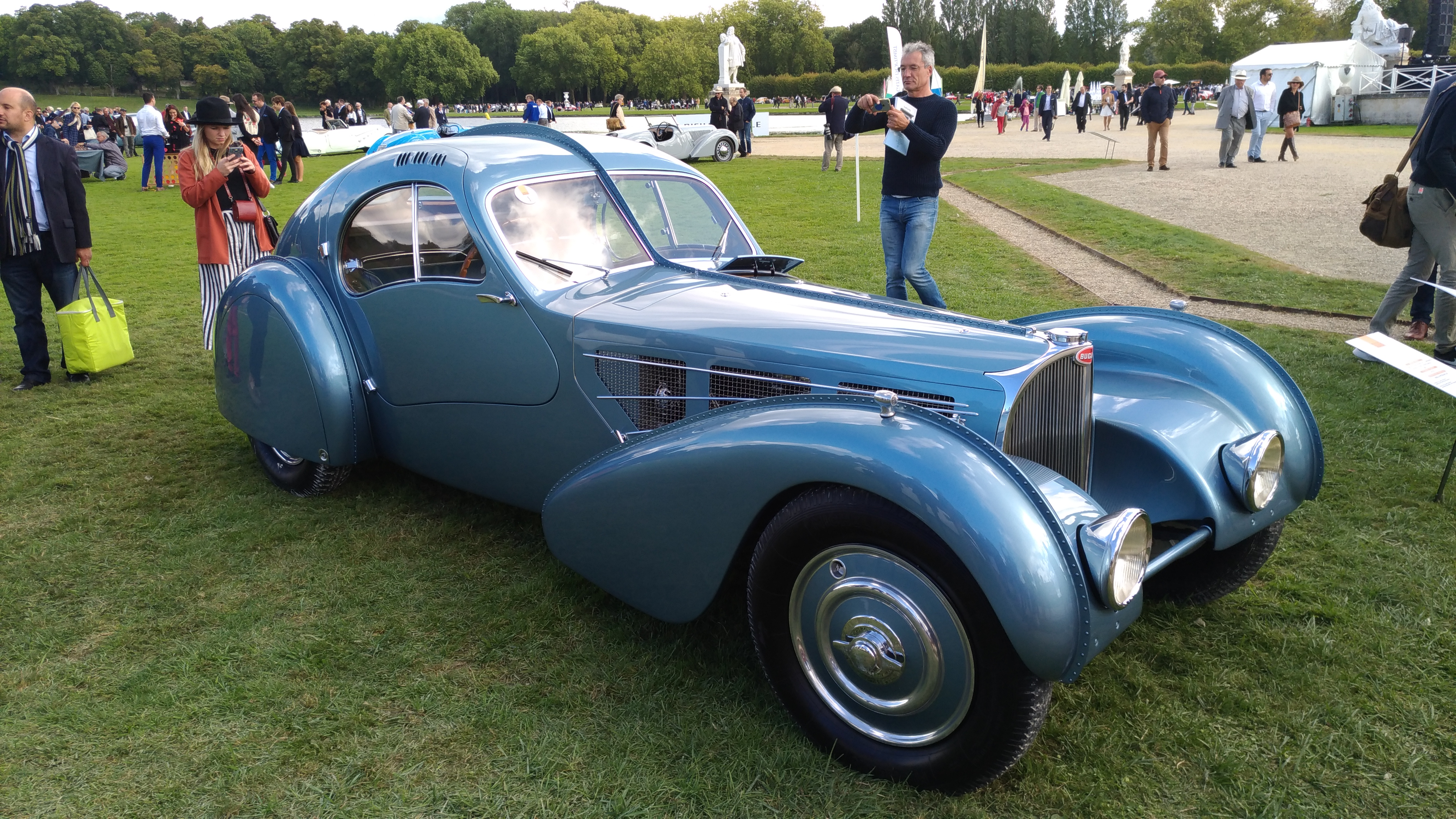 Chantilly Arts & Elegance 2017